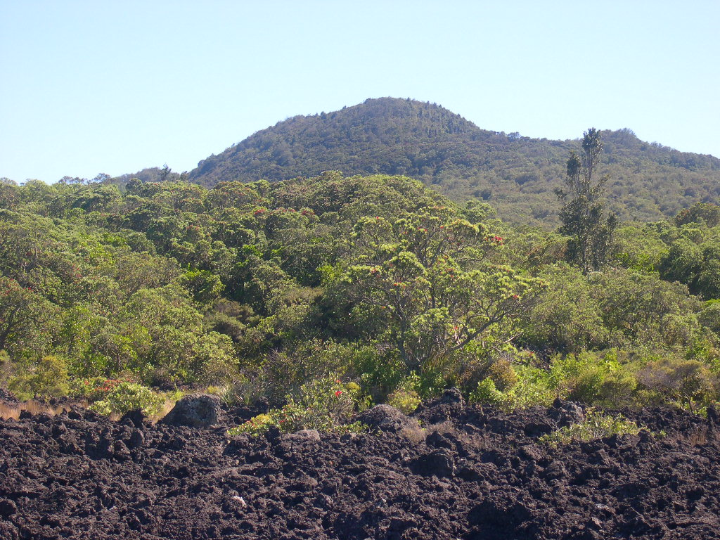 Blick auf den Gipfel... Im Vordergrund blüht noch ein Pohutukawa Baum. Rangitoto Island, with volcanic rock and pohutukawa tree in foreground.